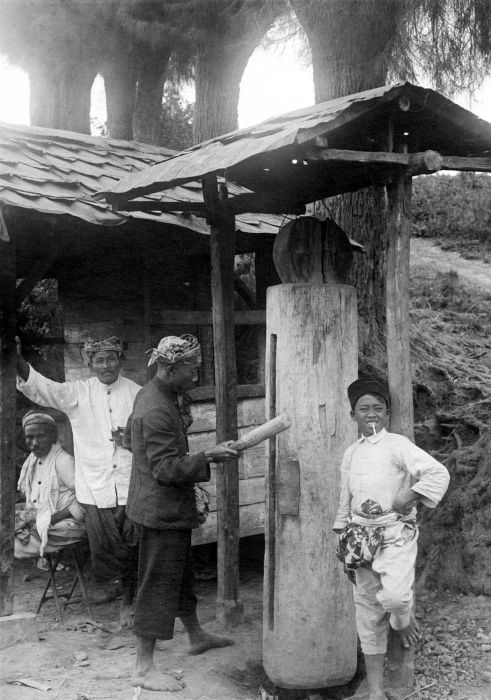 Repronegatief. Wachthuisje met tong-tong, Tosari, oost Java